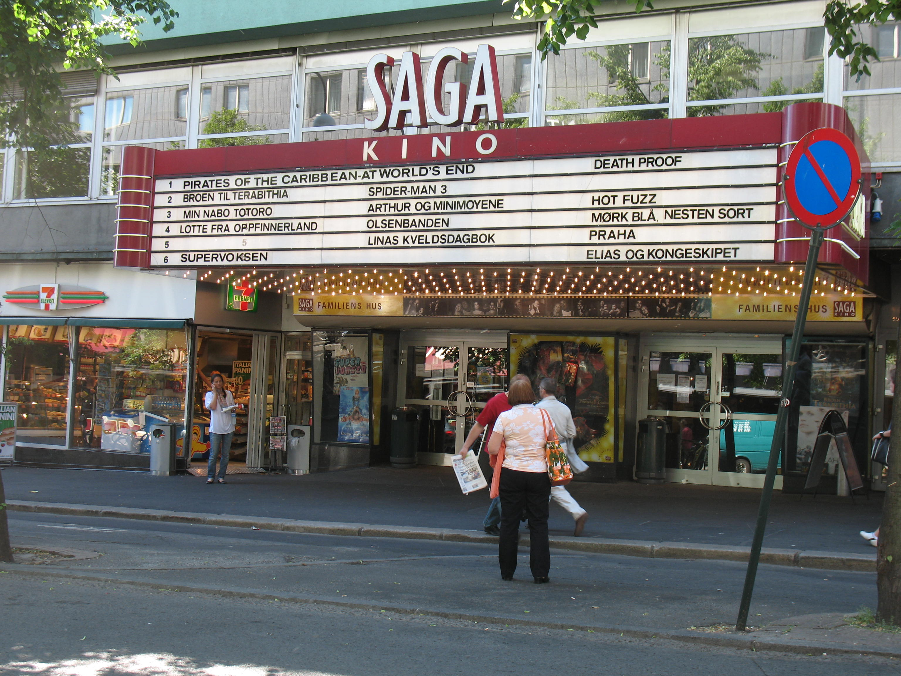 Saga kino i Oslo